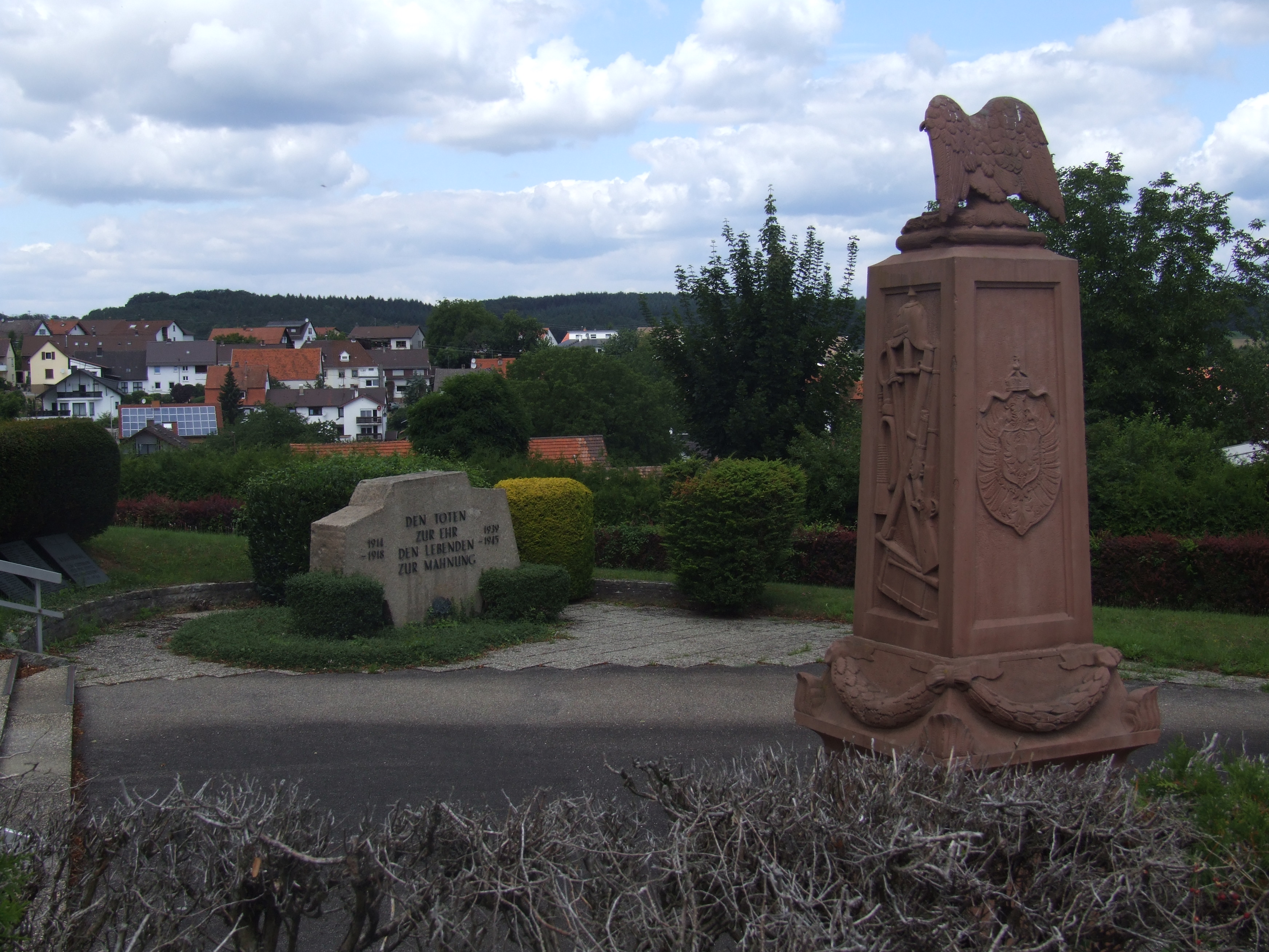 Kriegerdenkmal von 1870/71 auf dem Friedhof in Eschelbronn